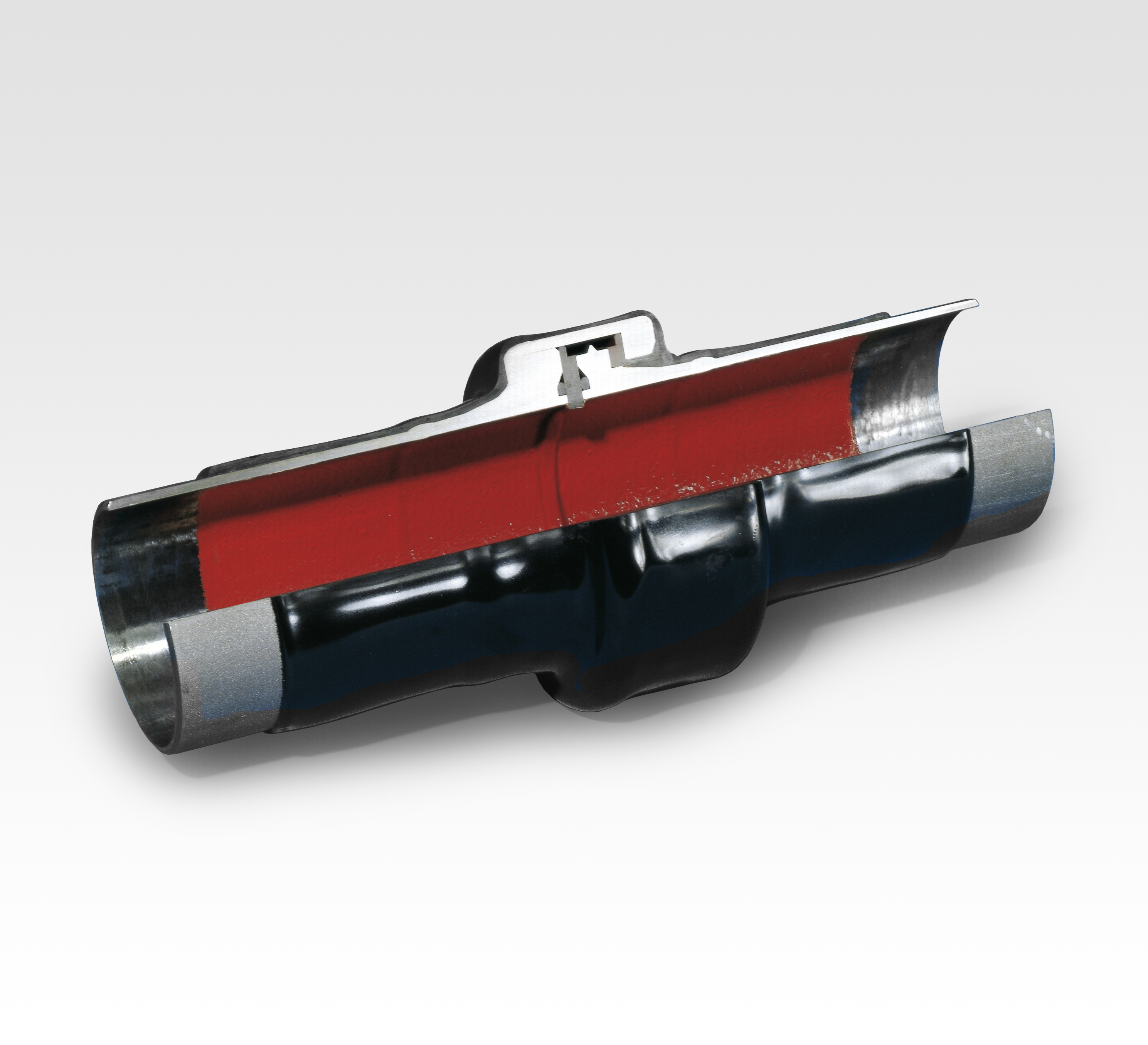 Isolierstück mit Ringfunkenstrecke der Firma Schuck: Schnittmodell